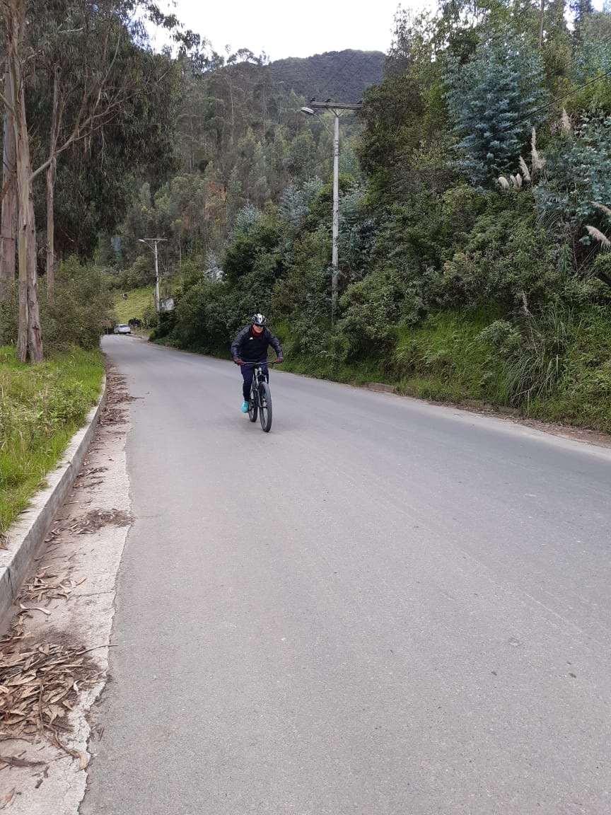 Sector campana Huaico biocorredor